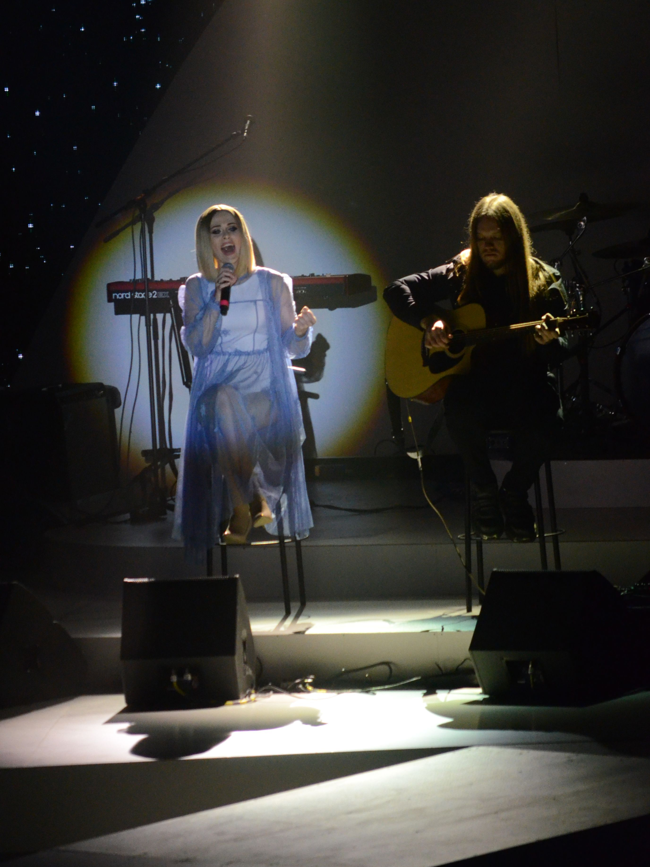 Урочиста церемонія проводів національної паралімпійської збірної команди України на XII зимові Паралімпійські ігри. Виступ гурту The Hardkiss.